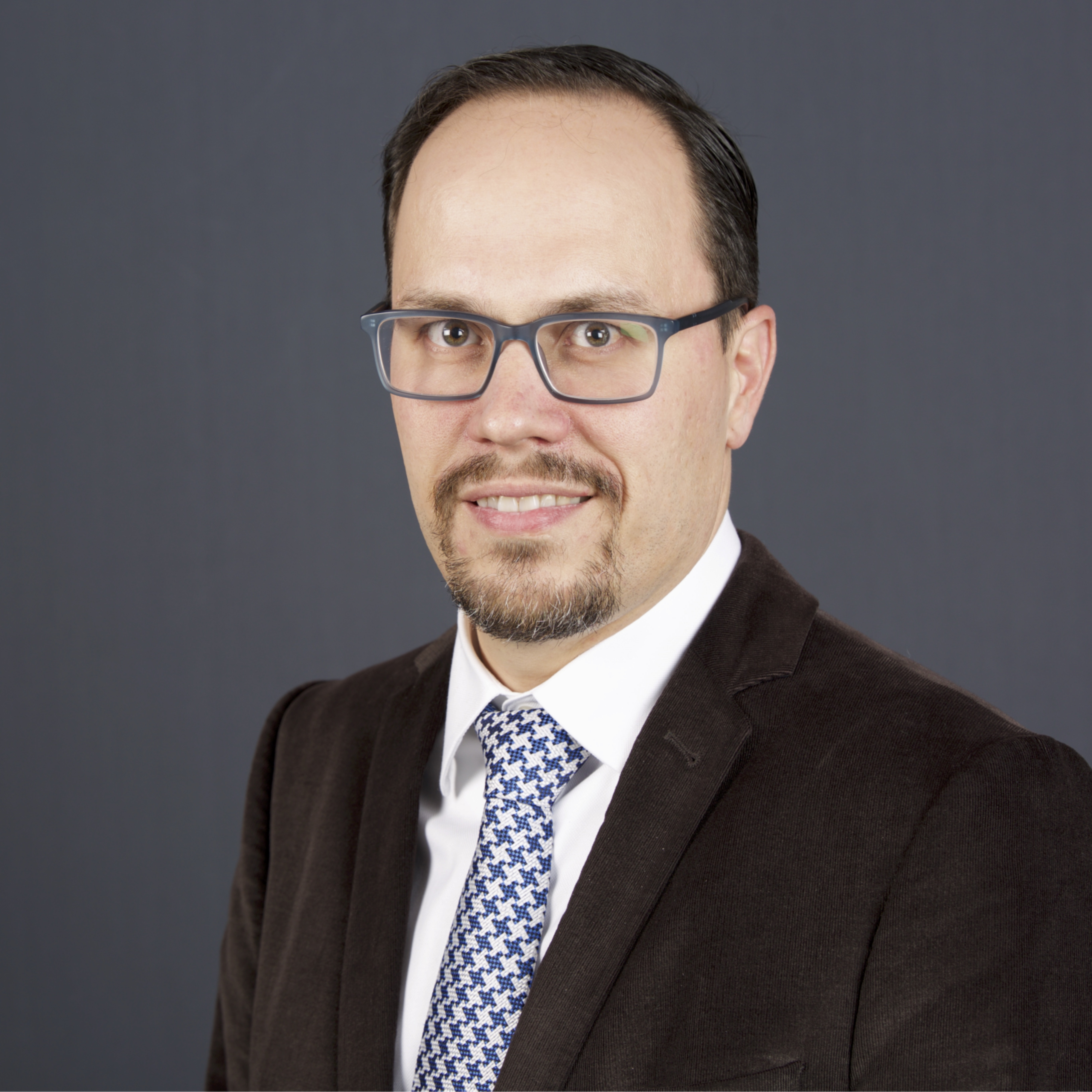 Dirk Panter (SPD)